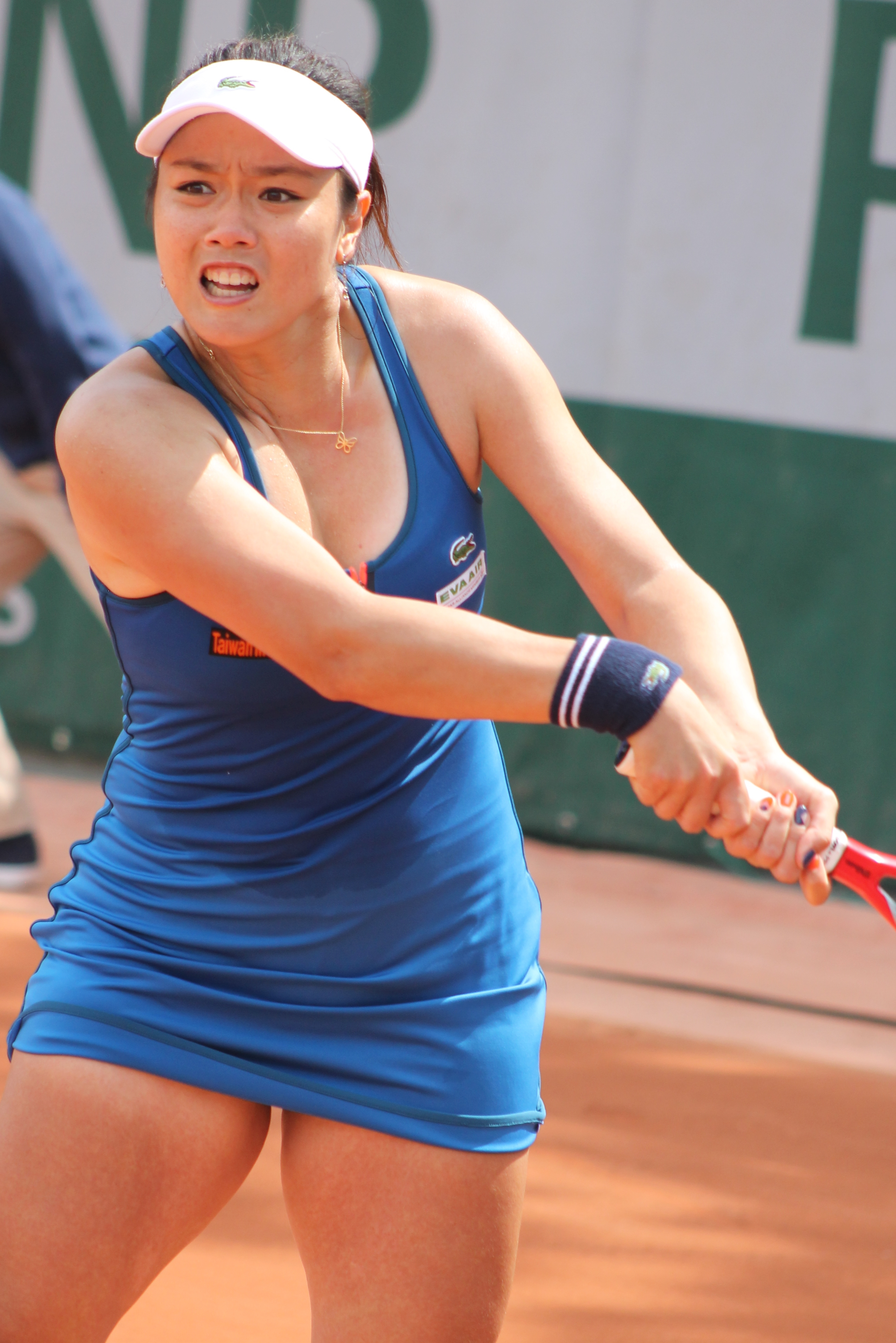 Chan Y.J. RG15 (9)